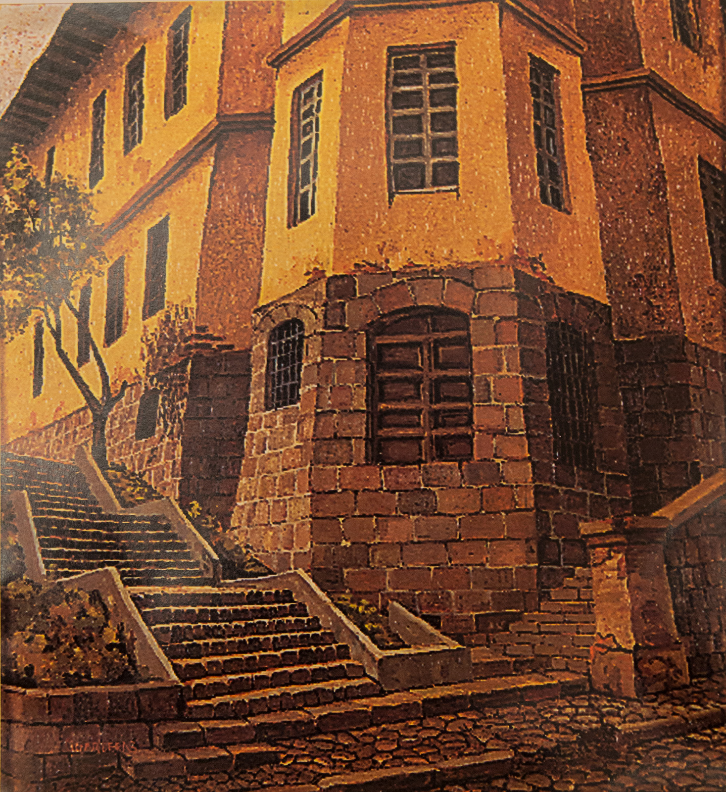 Fachada exterior de la antigua sala Santa Magdalena.